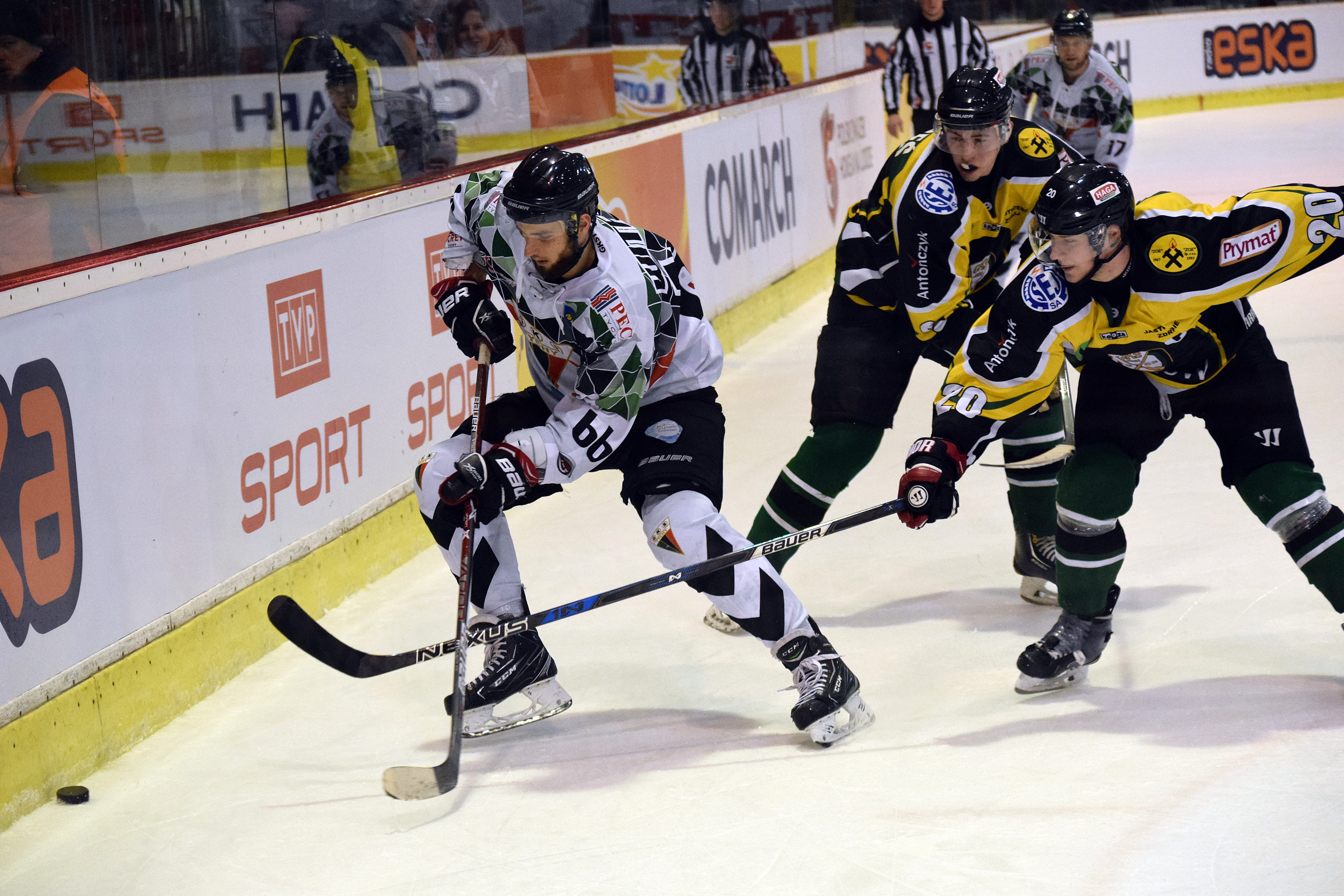 Półfinał Jakub Witecki #66 (GKS Tychy) Łukasz Nalewajka #20 (JKH Jastrzębie)